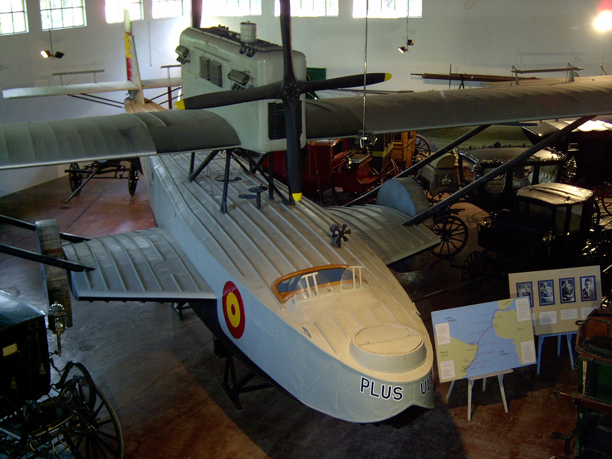 El hidroavión Dornier Do J "Plus Ultra" en el Complejo Museográfico Provincial "Enrique Udaondo" de Luján, Argentina. Autor: Jesús Manuel Cuartero. Fotografía propia.